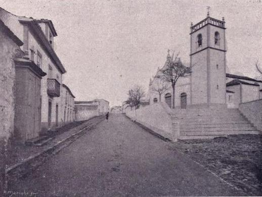 "Vila do Porto - Rua da Conceição" in CABRAL, Júlio. "A Imprensa em Santa Maria", apud Álbum Açoriano, fascículo nº 37, 1903. pp. 293-295.